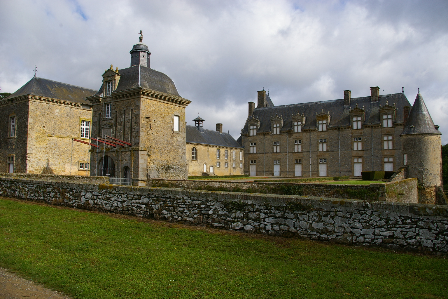 Château de Montecler, Châtres-la-Forêt (Mayenne)